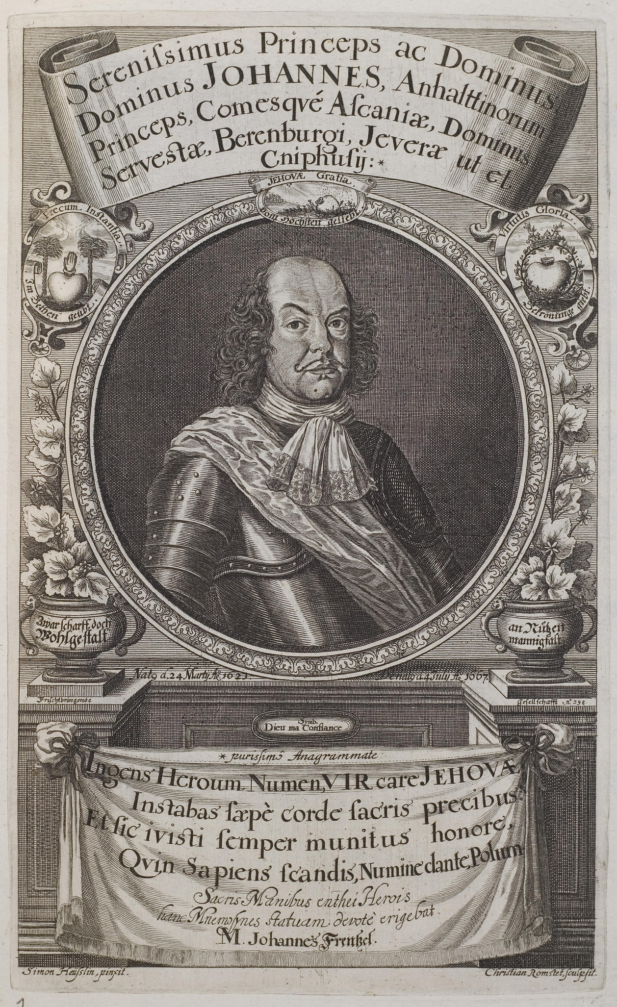 Grafik aus dem Klebeband Nr. 2 der Fürstlich Waldeckschen Hofbibliothek Arolsen Motiv: Johann VI. von Anhalt-Zerbst, Fürst von Anhalt-Zerbst, Mitglied der Fruchtbringenden Gesellschaft Nr. 398